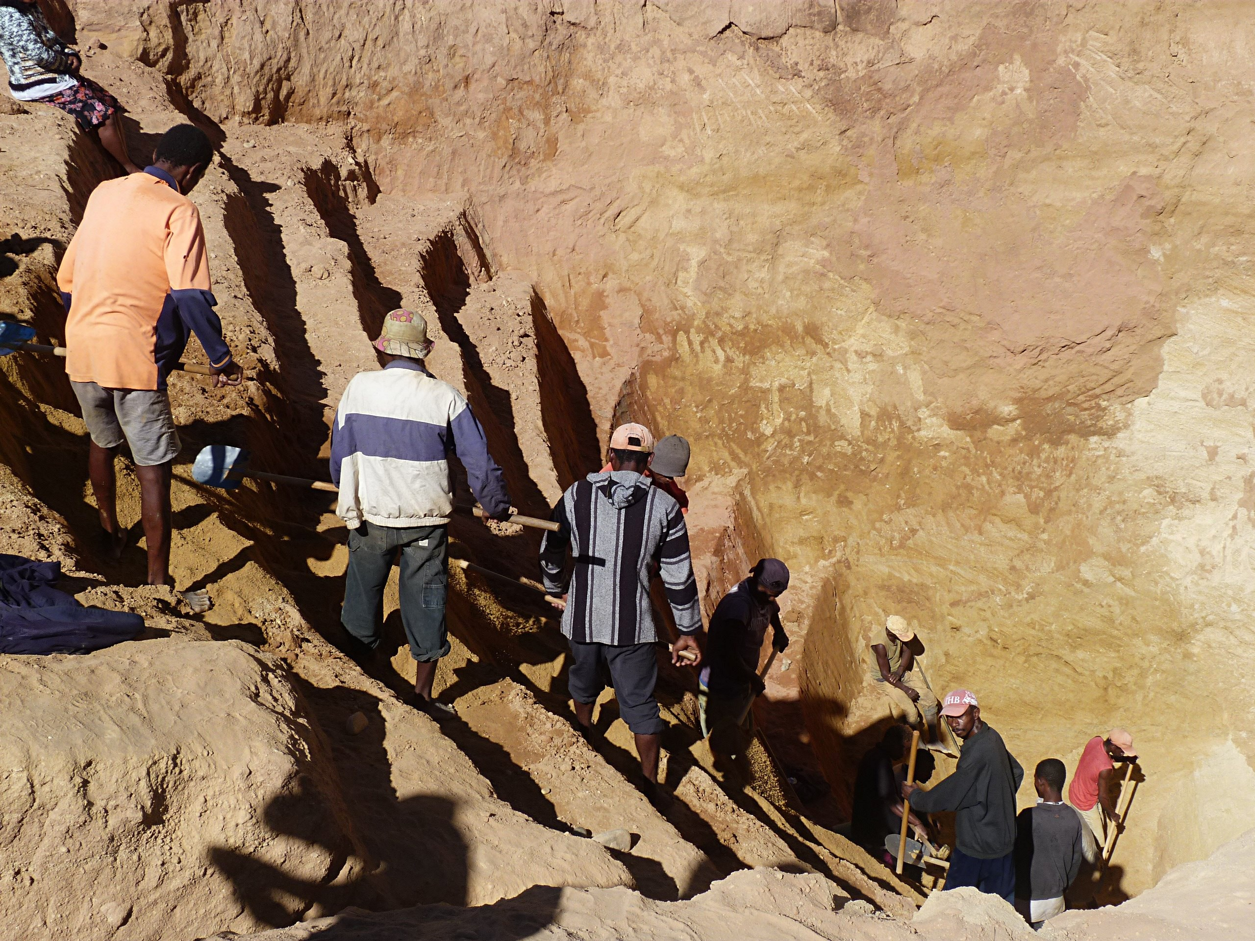 Mines à ciel ouvert, Ilakaka, Madagascar.